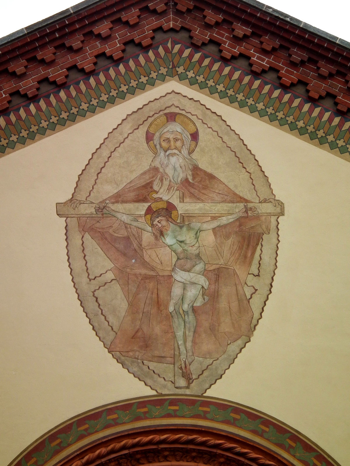 Pinerolo Cathedral San Donato Native nameDuomo di PineroloLocationPinerolo, ItalyCoordinates44° 53′ 08″ N, 7° 19′ 48″ E WebsiteParrocchia di San Donato nella CattedraleAuthority control : Q743305